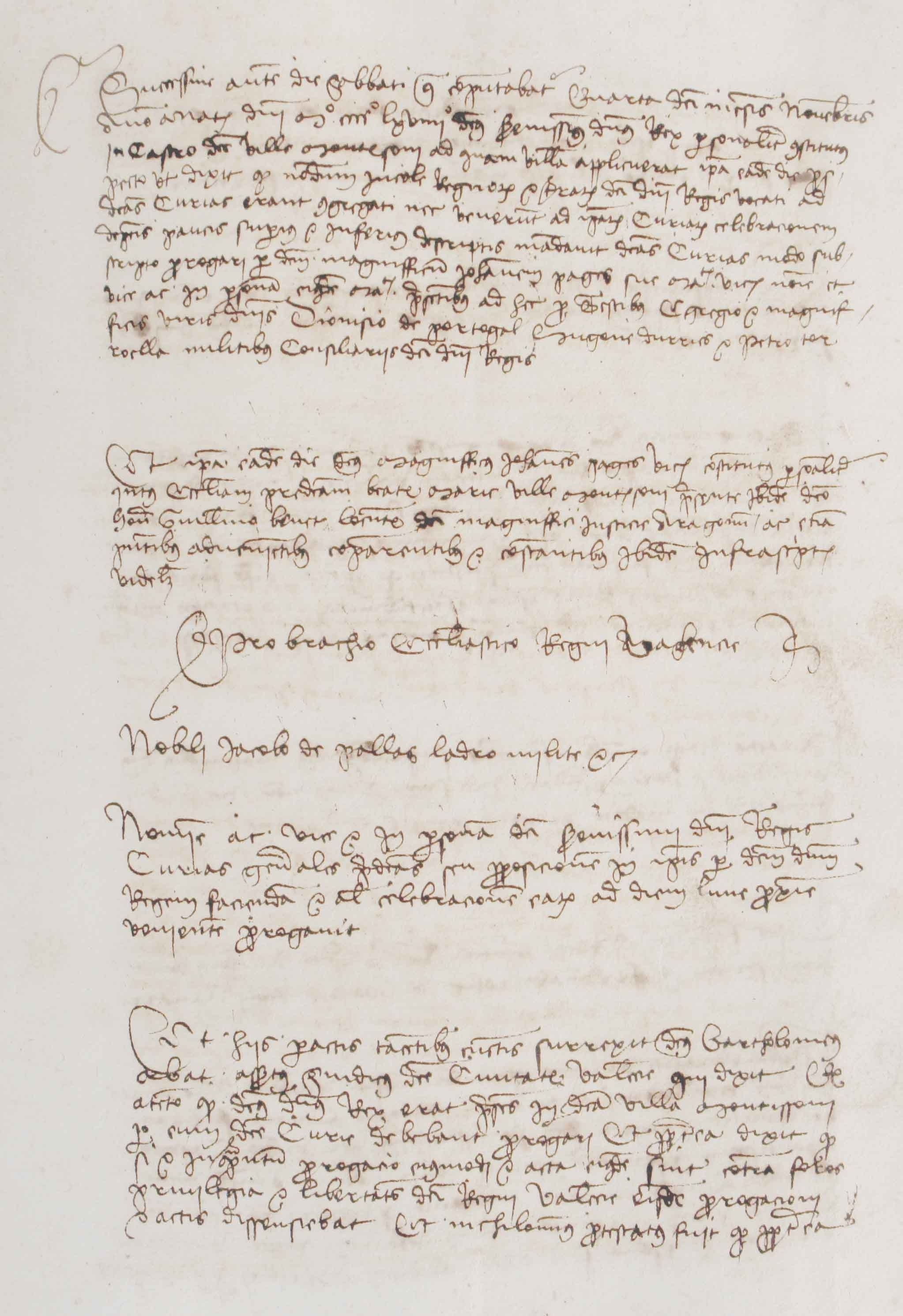 Llibre de les Corts de Montsó de 1469 - 1470. Manuscrit on el síndic enviat com a representant de la ciutat, va anotar totes les deliberacions, votacions i acords que es van prendre. Dades tècniques Títol: Proses de les Corts de la vila de Montsó des dels anys 1469 fins a 1470 Data: 1469-1470 Suport material: paper relligat en pergamí Mides: 210 x 300 mm